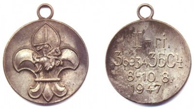 Беларуская (тарашкевіца): Мэдаль-значка II зьезду «Згуртаваньня Беларускіх Скаўтаў на Чужыне» 1947 medallion from the Second Congress of the Belarusian Scout Association Abroad ZBSCh